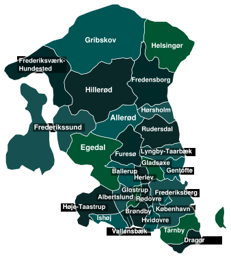 Region Hovedstaden, Denmark